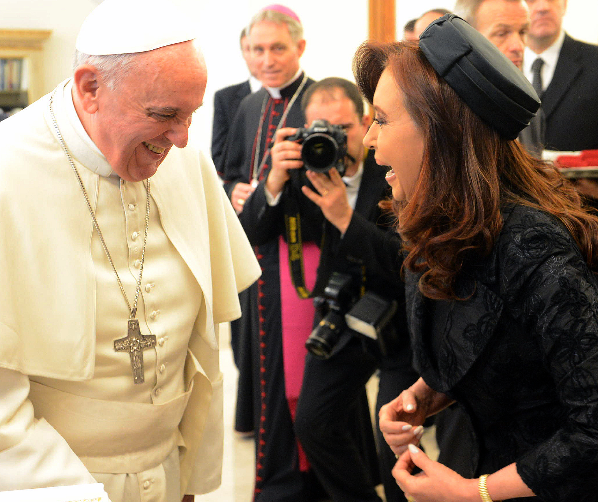 La présidente Cristina Fernández de Kirchner en visite au pape François le 17 mars 2014. En arrière plan George Gänswein en livrée violette.